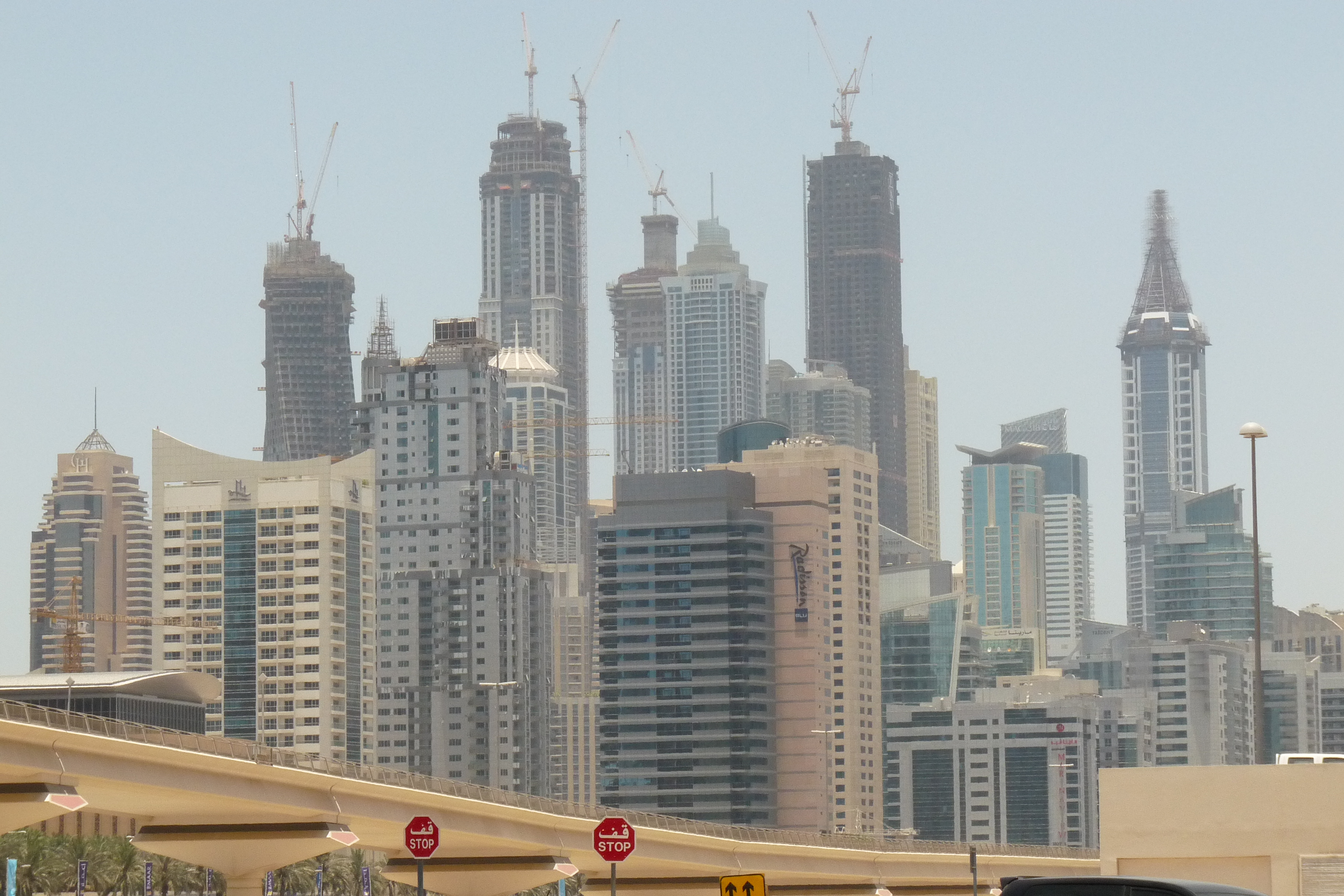 Dubai